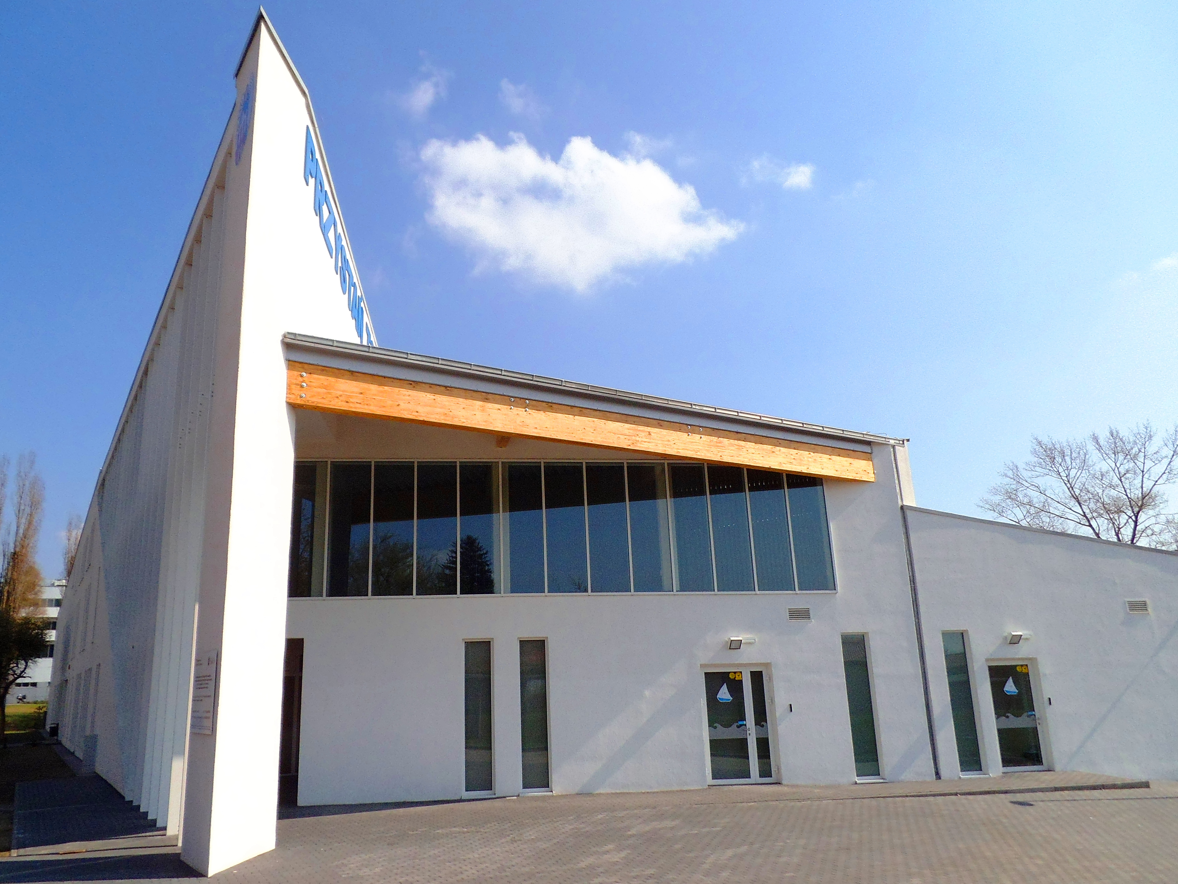 Przystań AZS w Toruniu8